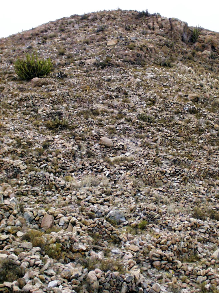 Pucará de Saxamar This is a photo of a national monument in Chile: 1282